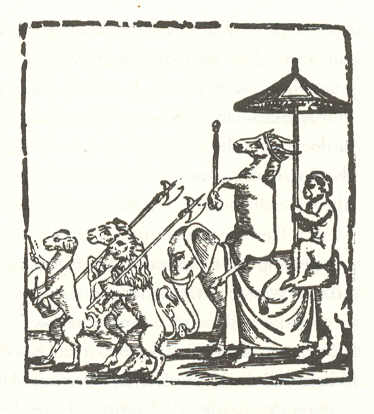 Hanno mit Baraballo